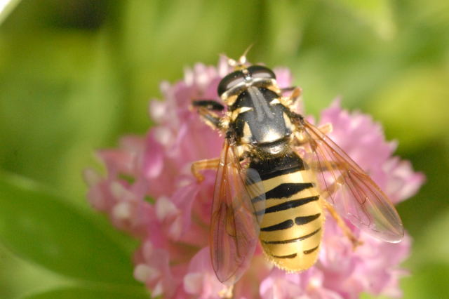 Temnostoma vespiforme from Commanster, Belgian High Ardennes .